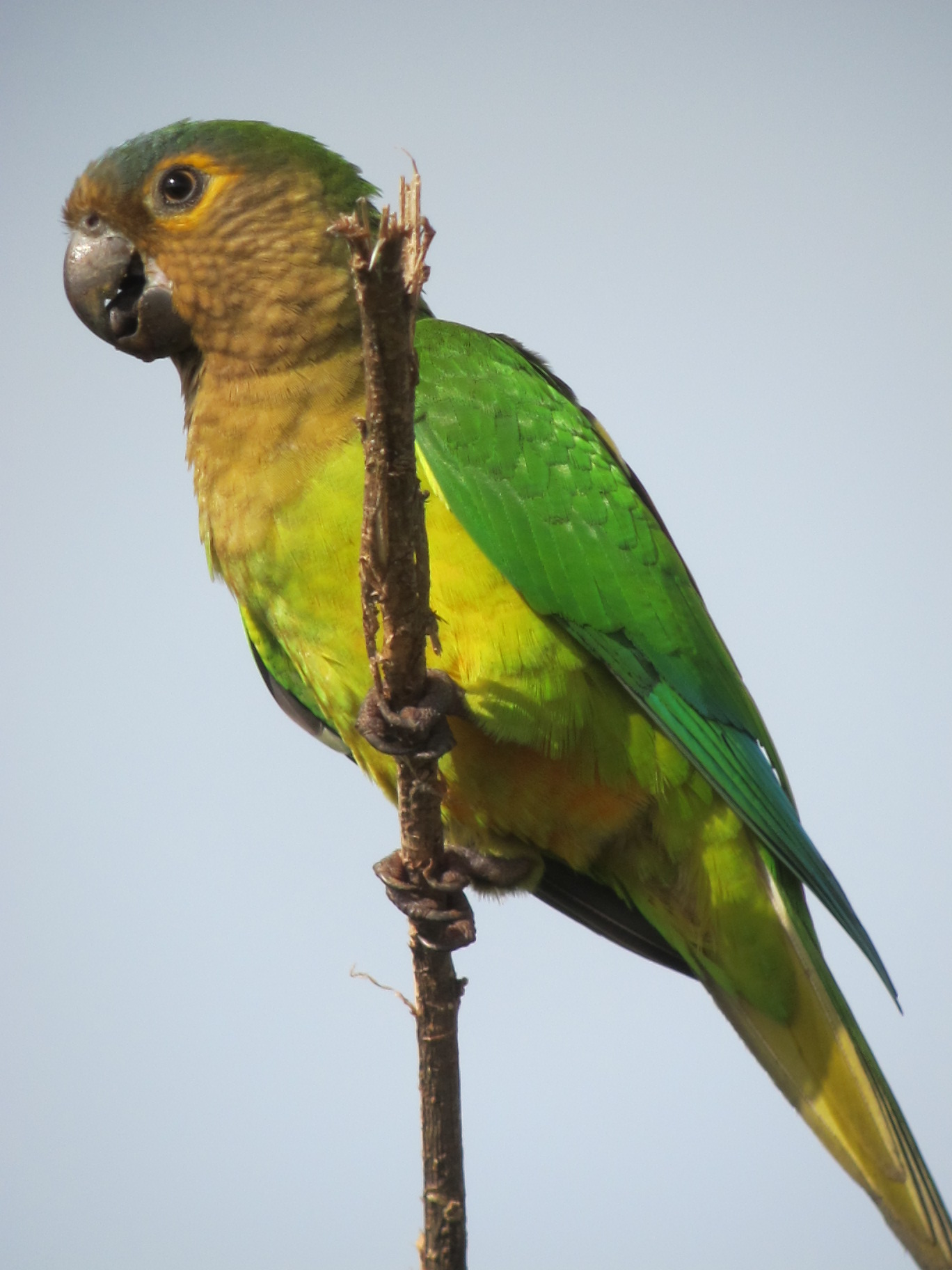 Arauca, Arauca, Colombia